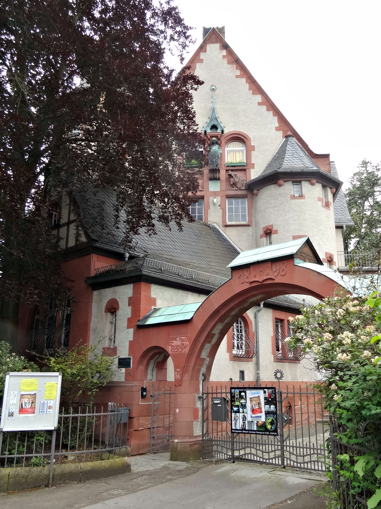 Haus Haardteck, Herdweg 79 in Darmstadt